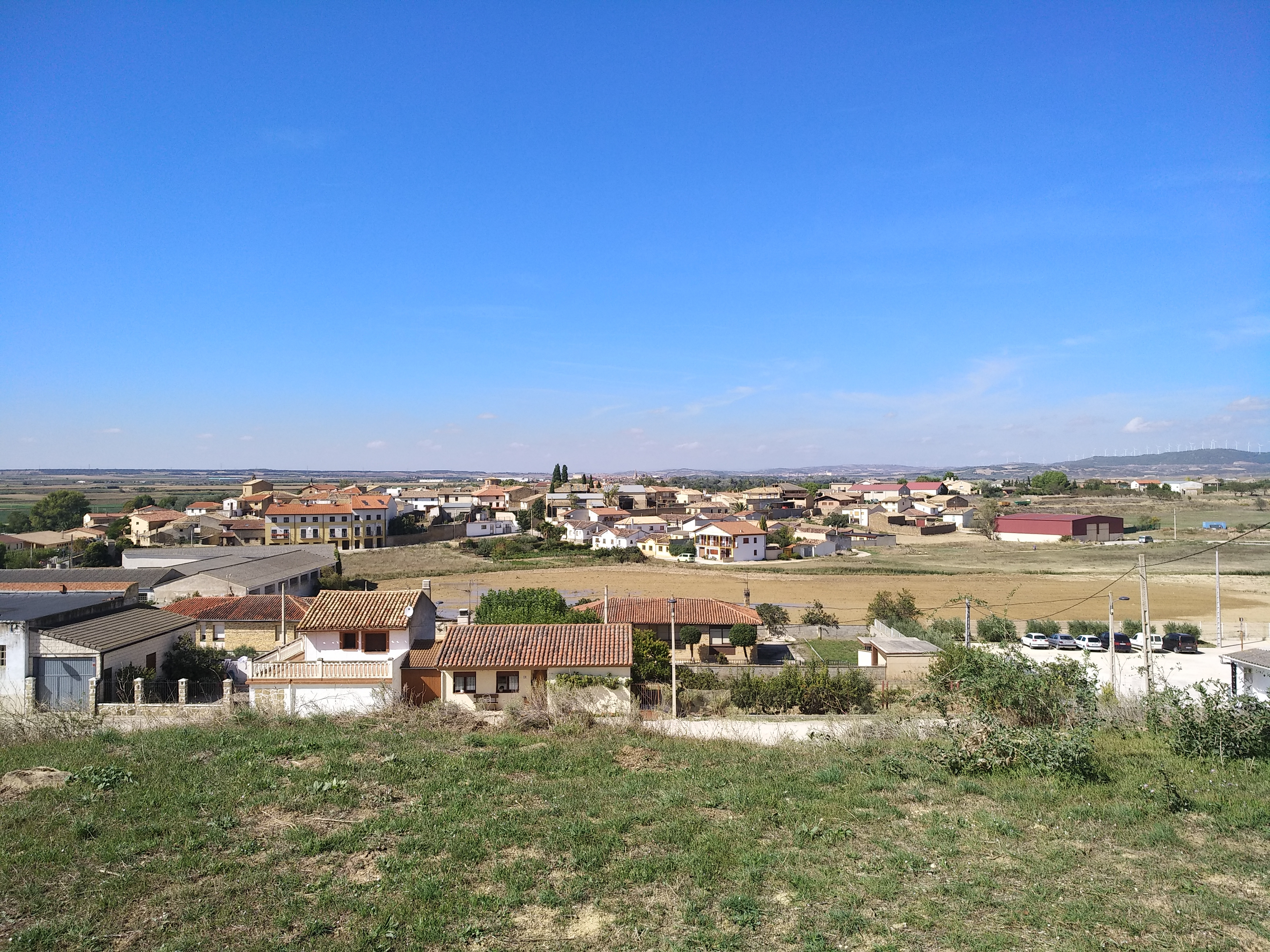 Vista general de Beire